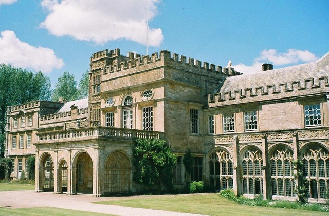 Forde Abbey: detail